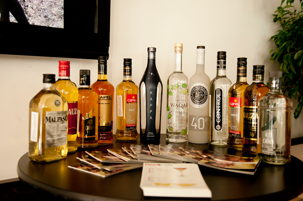 Piscos Chilenos en muestra en La Serena Chile